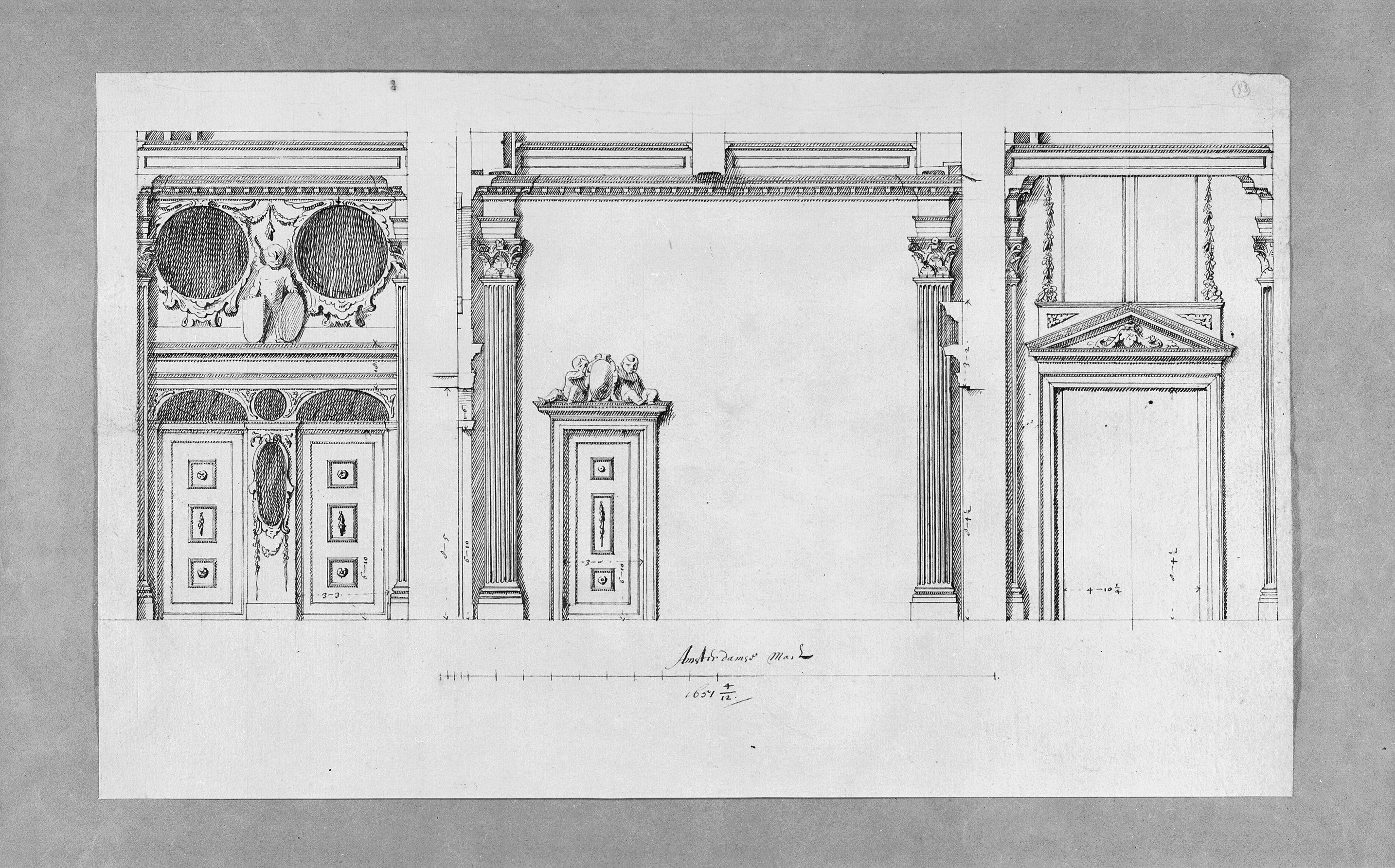 perceel: voorhuis tekening Pieter Post in bezit van Rijksdienst van de Monumentenzorg